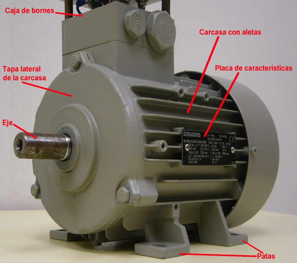 Fotografía de un motor asíncrono de jaula de ardilla de 0,55 kW, 50 Hz, 230/400 V y 1400 rpm, con indicación de sus elementos más importantes.